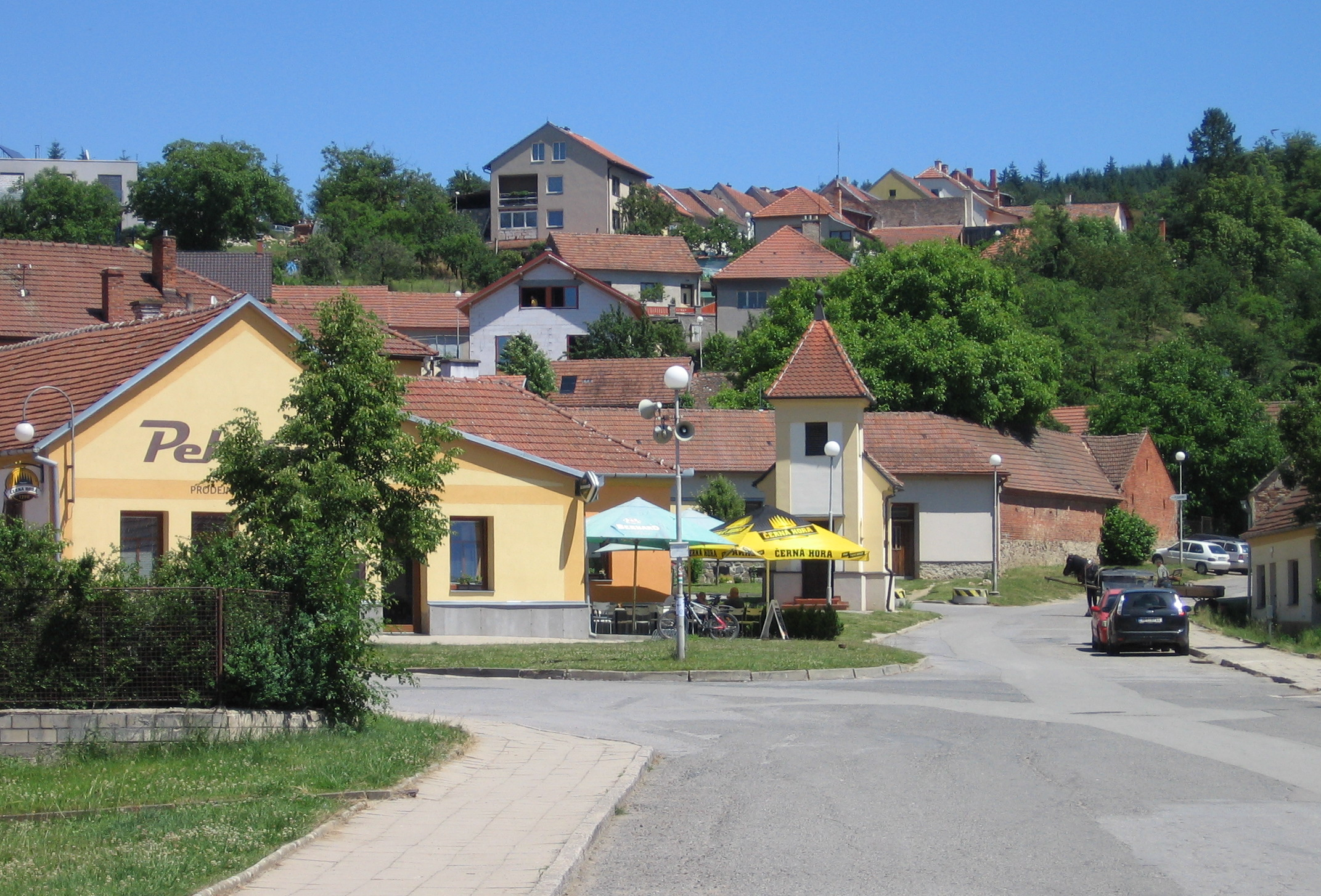 Jinačovice - náves.